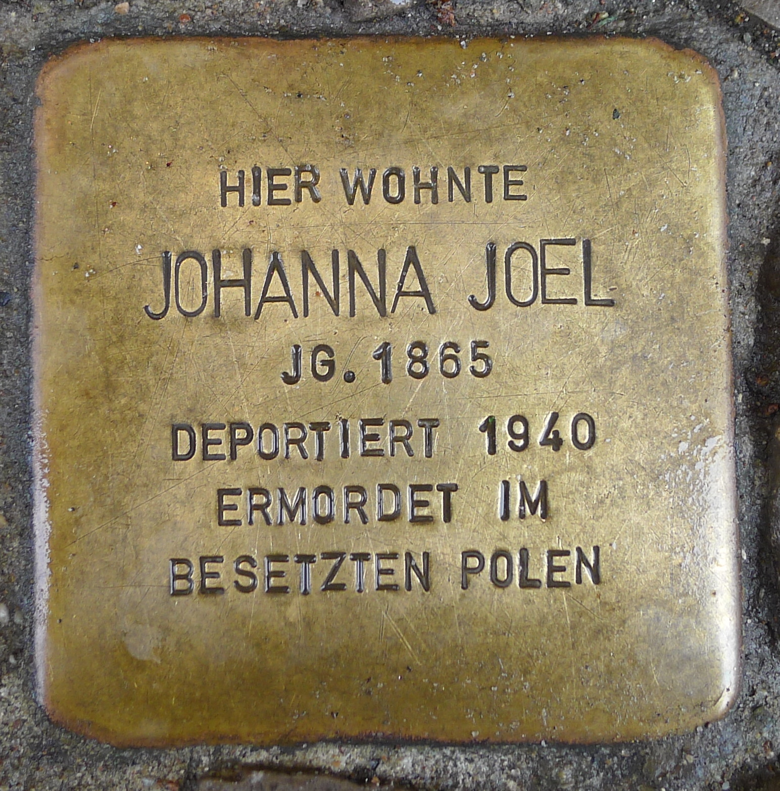 Stolperstein für Johanna Joel, Lange Straße 79, Greifswald